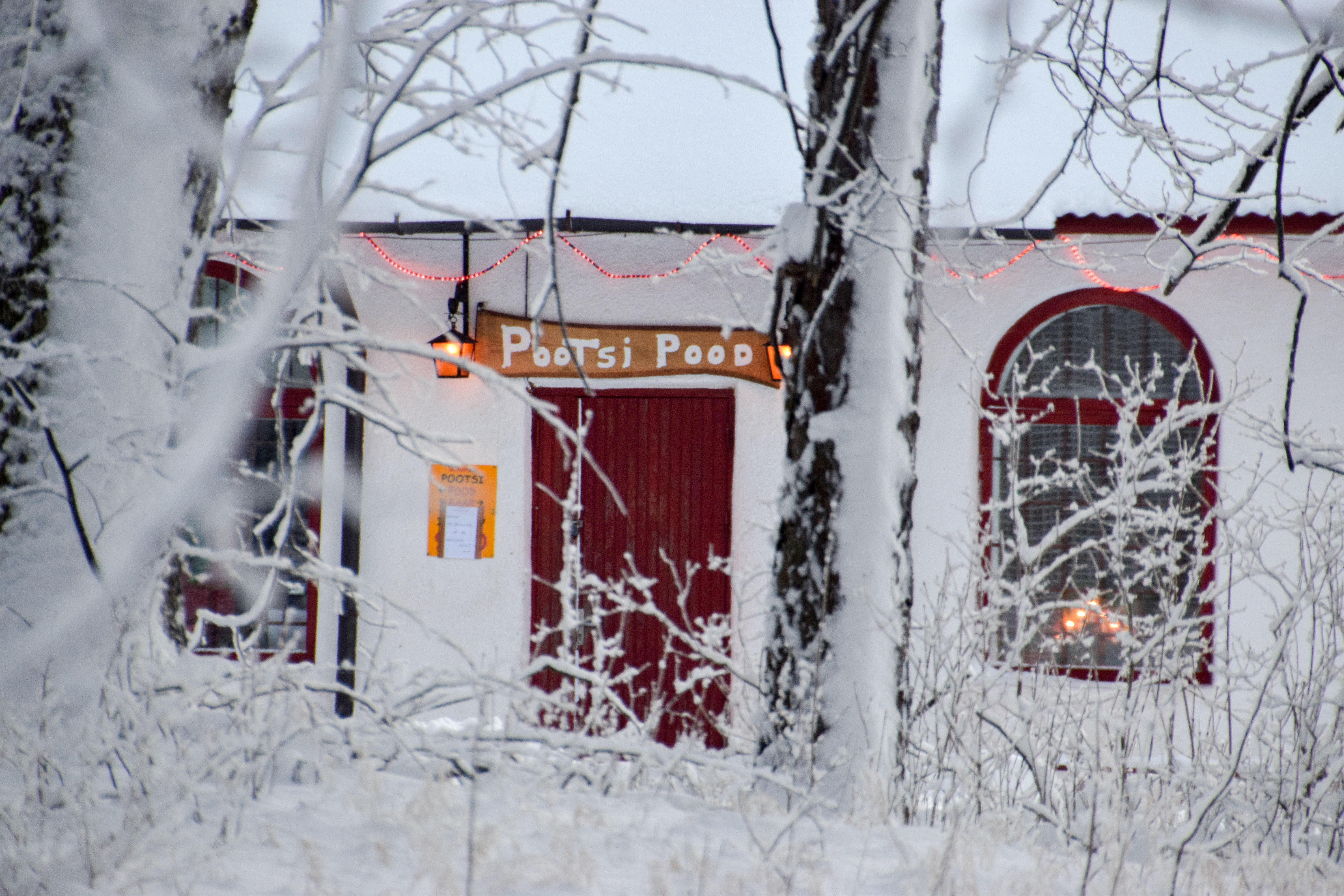 store